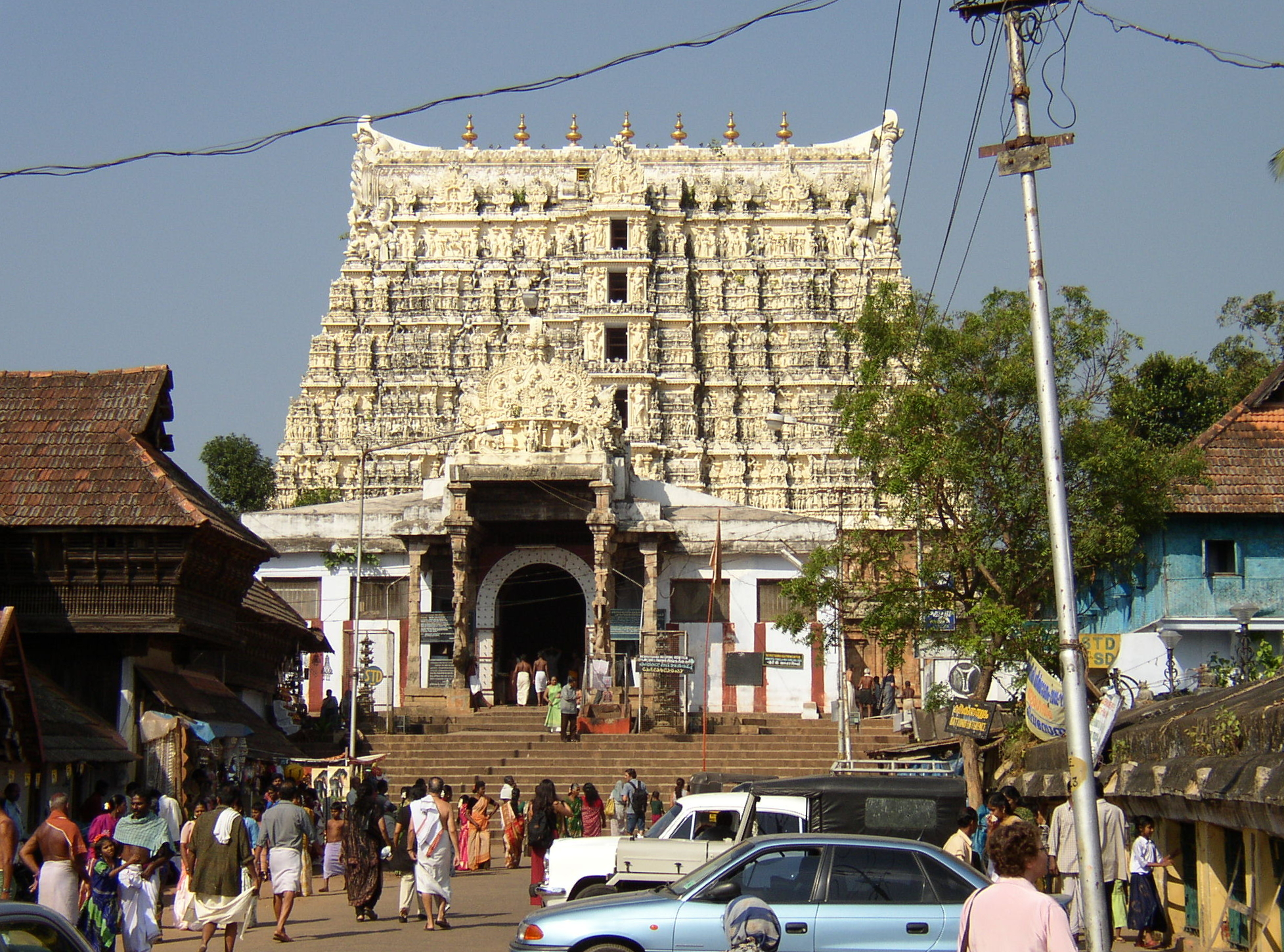 Sri Padmanabhaswamy temple in Thiruvananthapuram